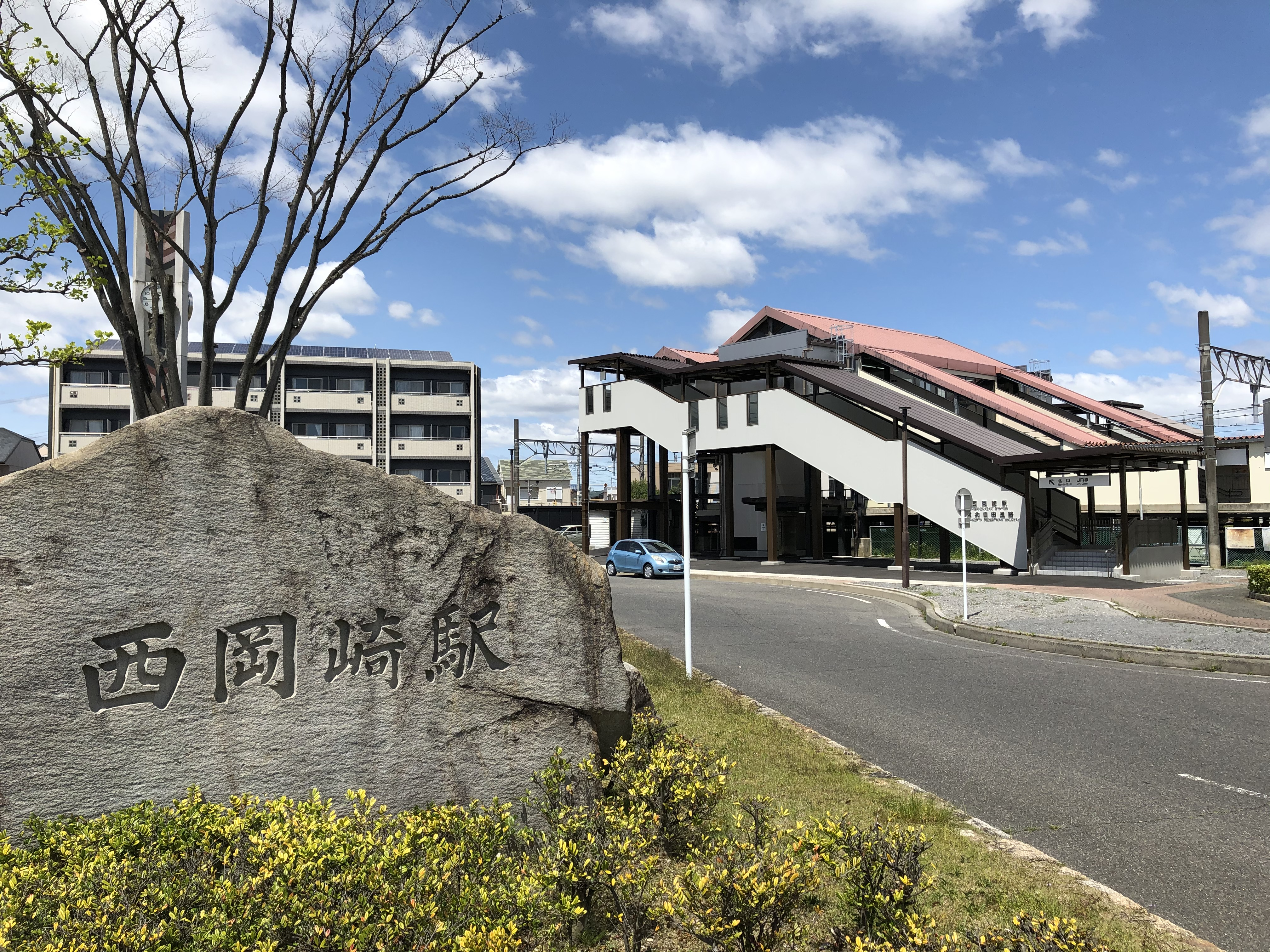 西岡崎駅（岡崎市昭和町）